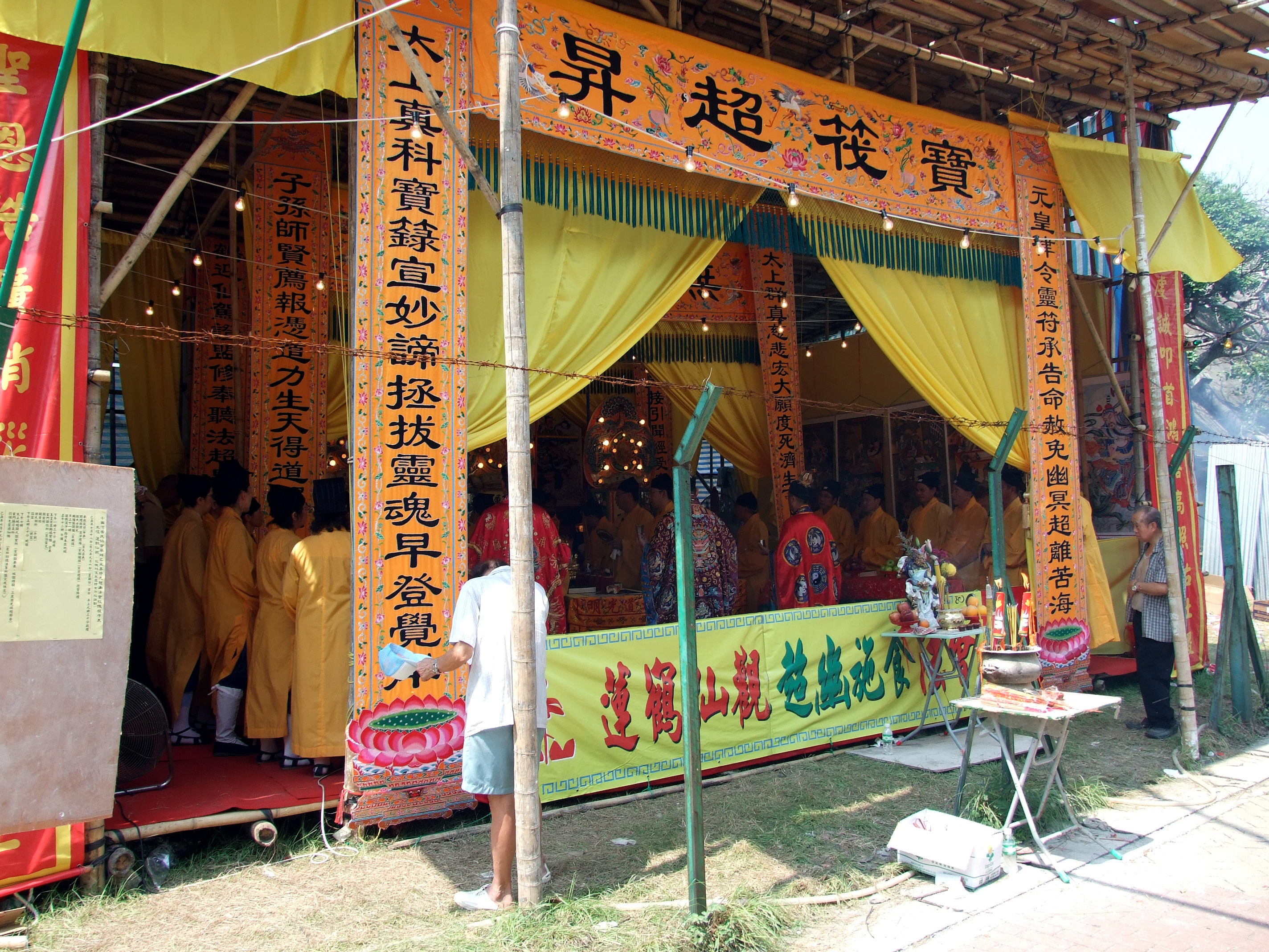 中文（香港）: 小西灣盂蘭勝會